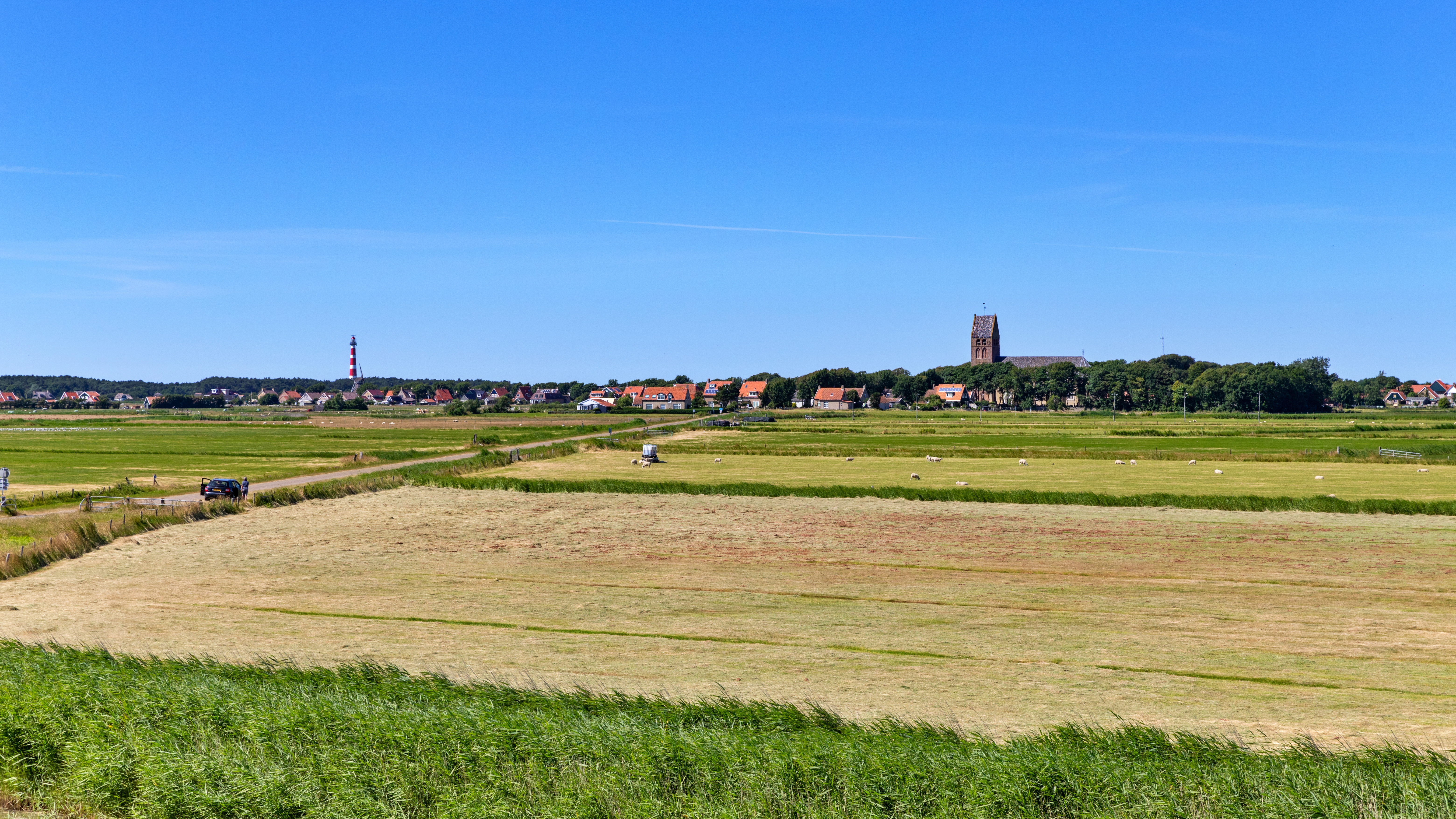 Hollum Ameland vanuit het zuiden